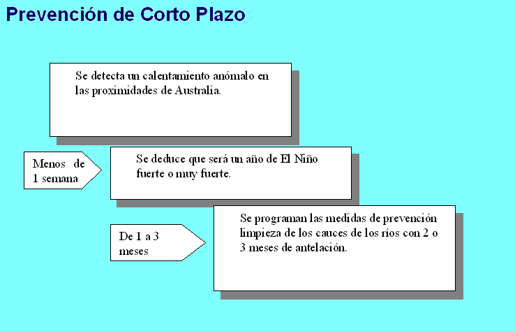 Fases de la prevención a corto plazo. Autor: Alfredobi